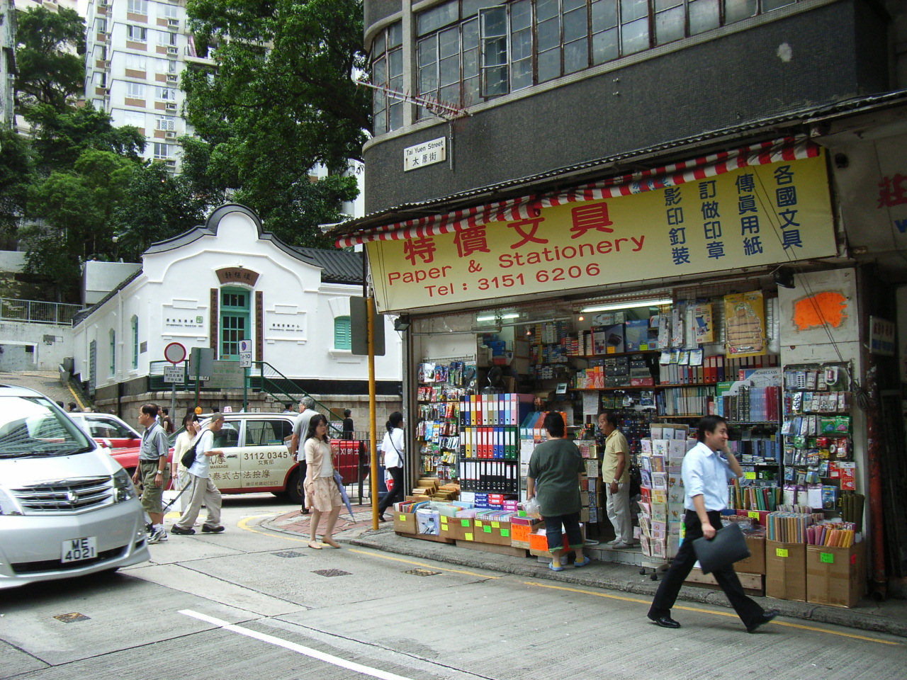 Hong Kong Wan Chai Tai Yuen Street, BY RICHARD MARTIN.